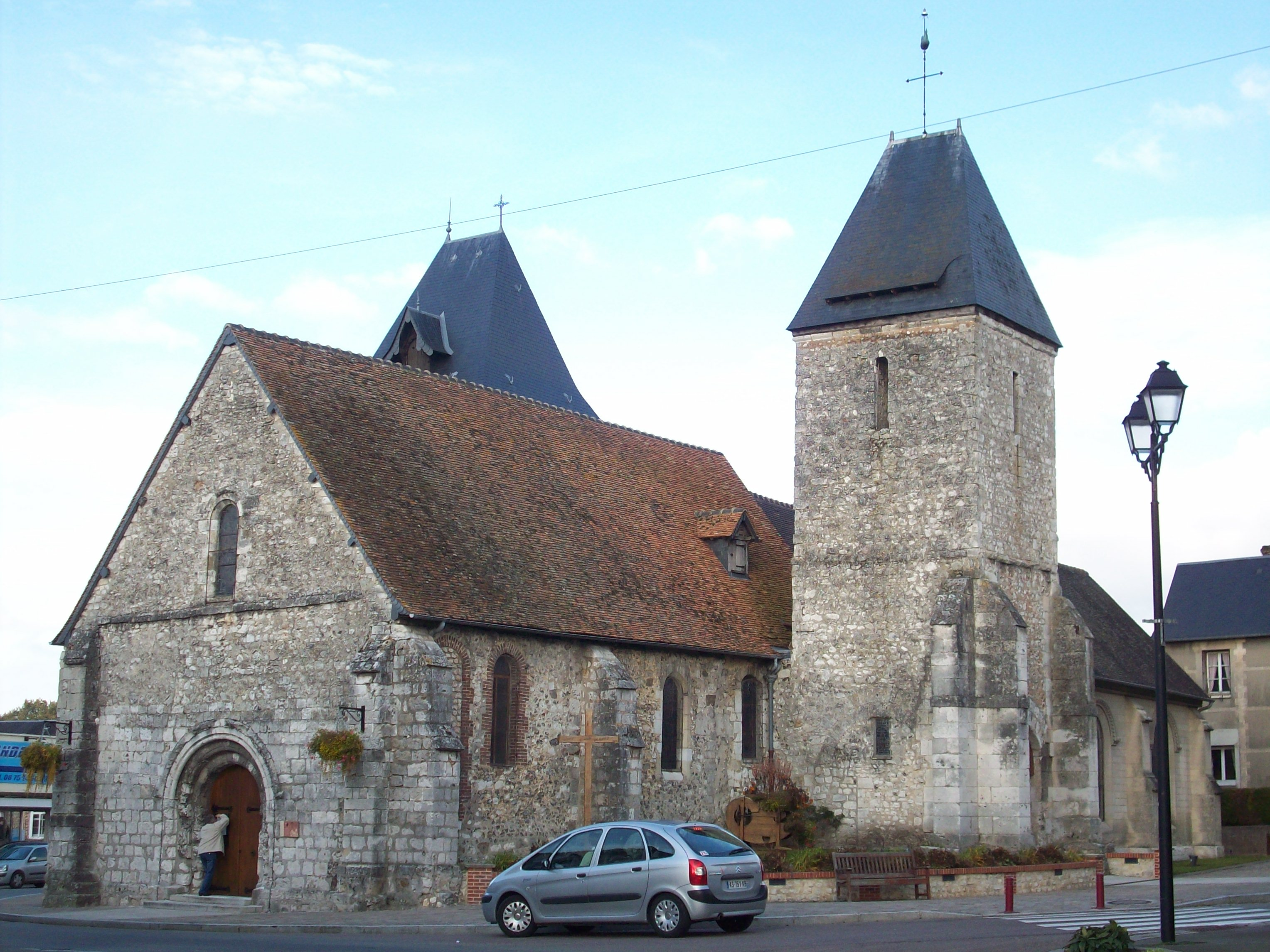 Eglise Saint-Denis de Charleval.